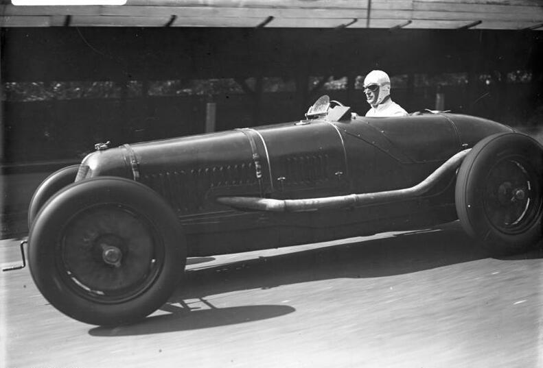 Interessante Aufnahmen vom letzten Trainingstag vor dem grossen internationalen Automobilrennen auf der Avus ! Der Mercedes-Fahrer Stuck im 150 Km. Tempo von einem nebenher fahrenden Auto fotografiert.